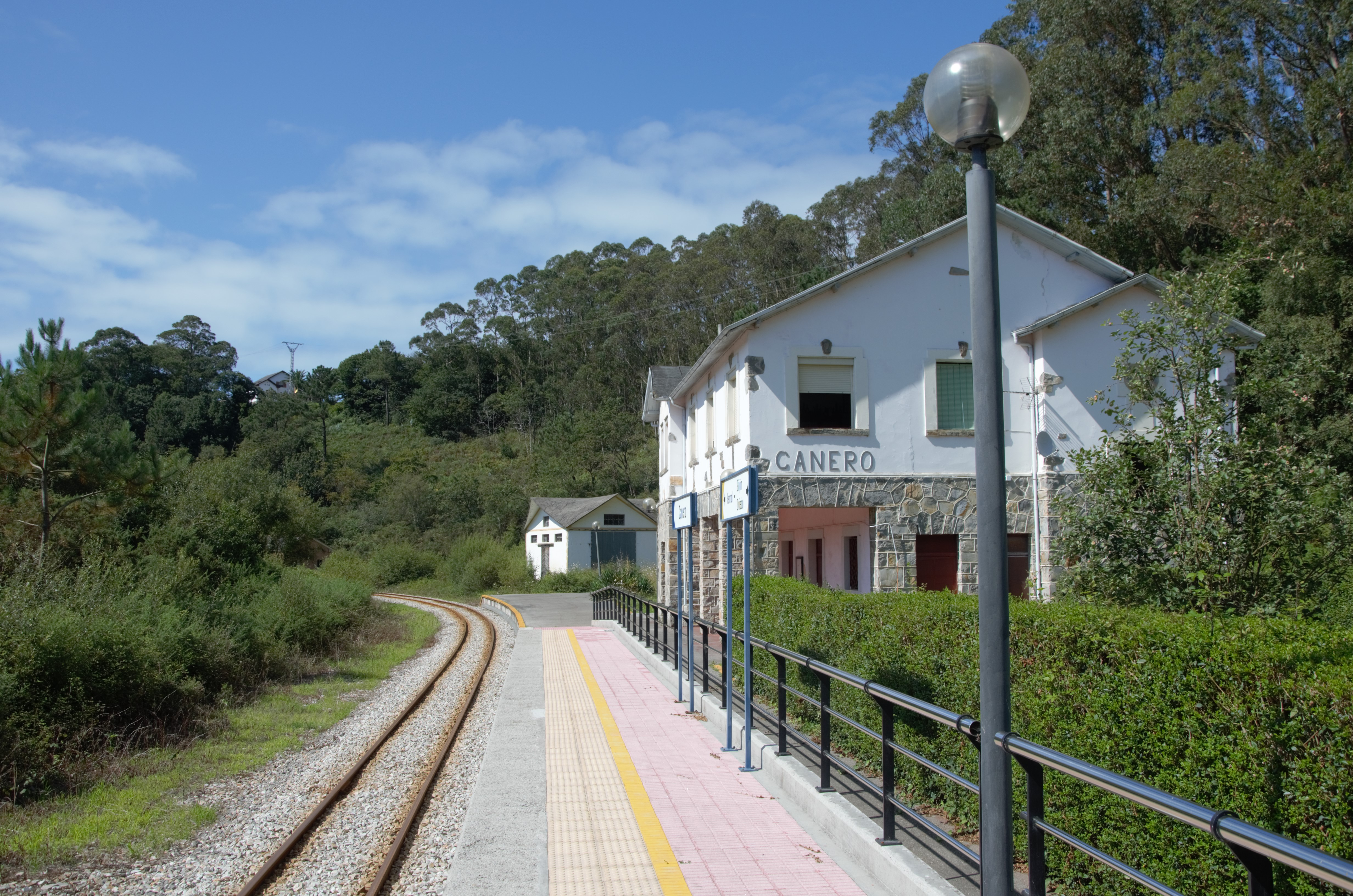 Estación de Canero (Valdés, Asturias)